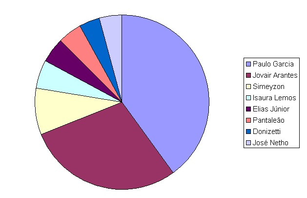 Distribuição do Horário Eleitoral Gratuito nas eleições municipais de 2012 em Goiânia, Goiás.